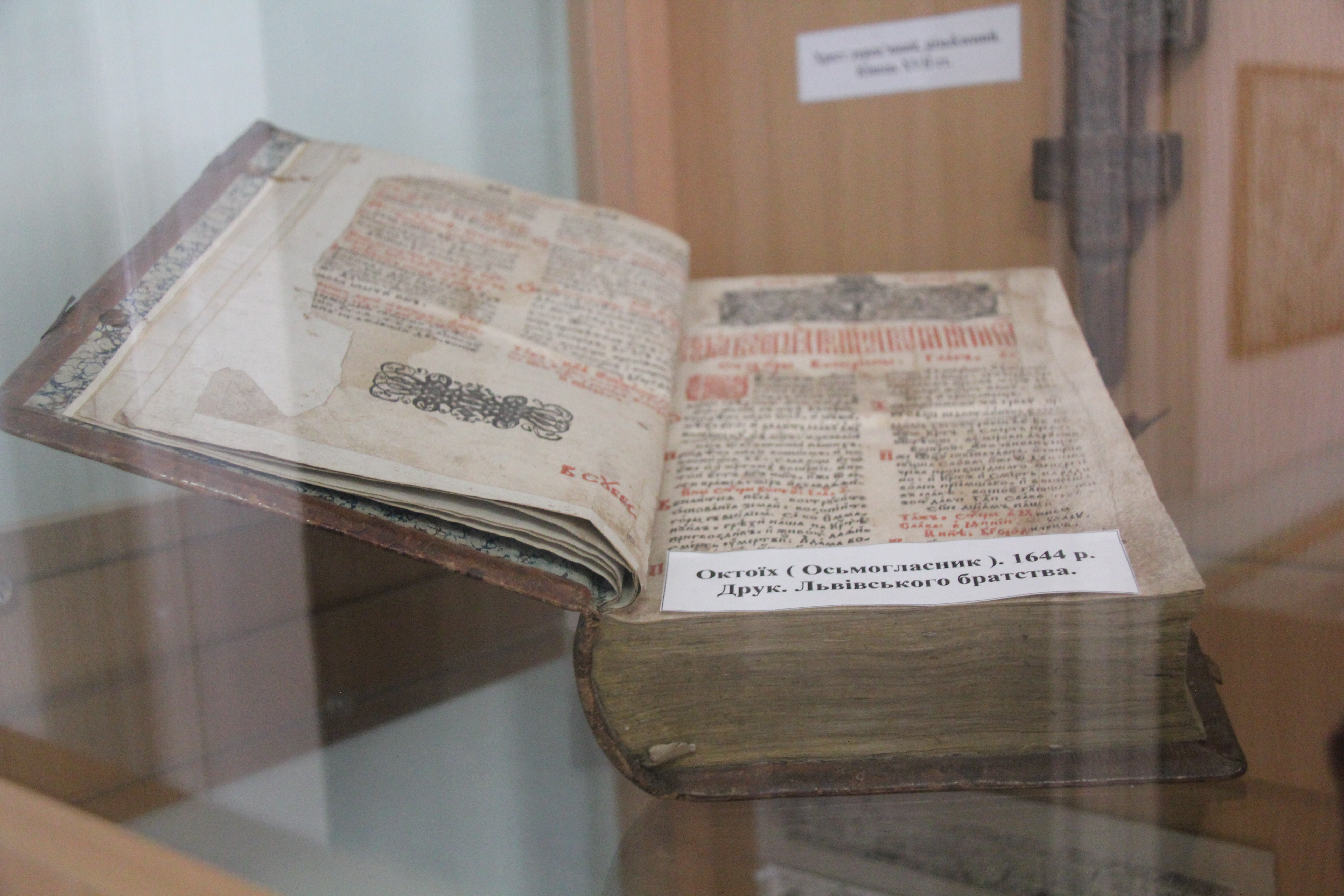 Основна експозиція обласного краєзнавчого музею Чернівців.